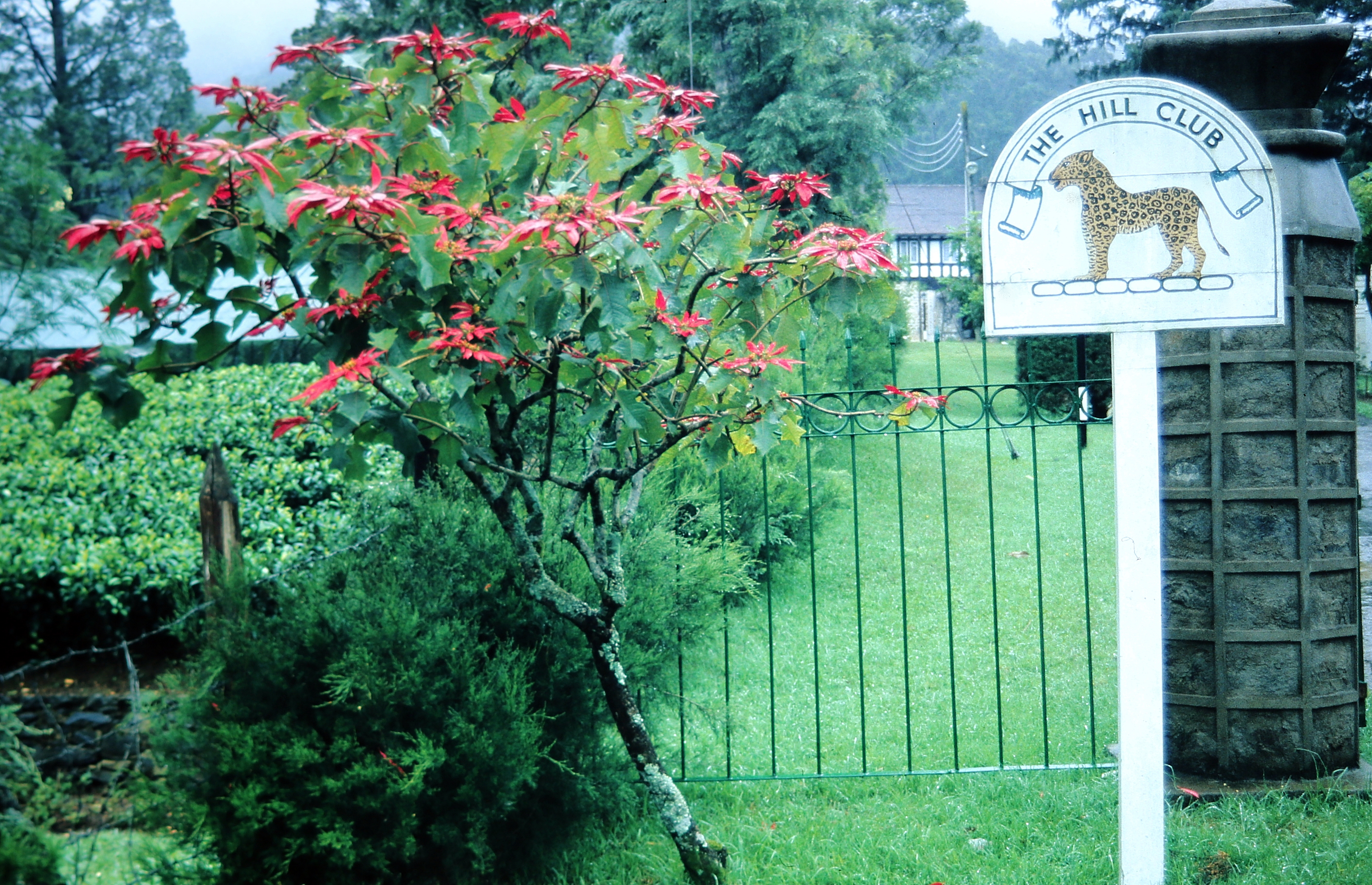 Blick in den Garten vom Hotel The Hill Club